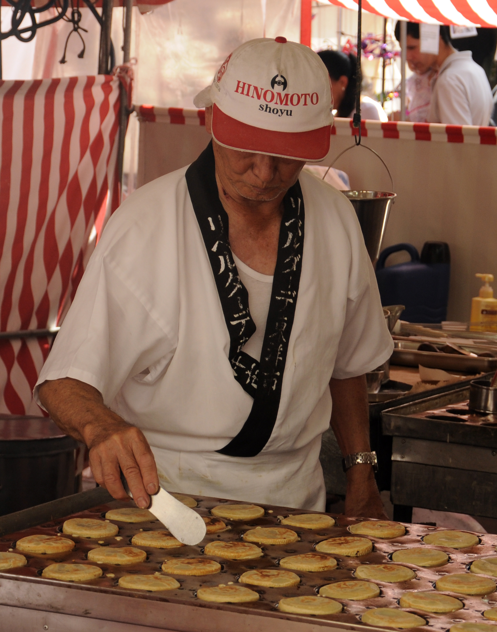 Foto de um senhor fazendo doce japonês na feira da Liberdade, em São Paulo